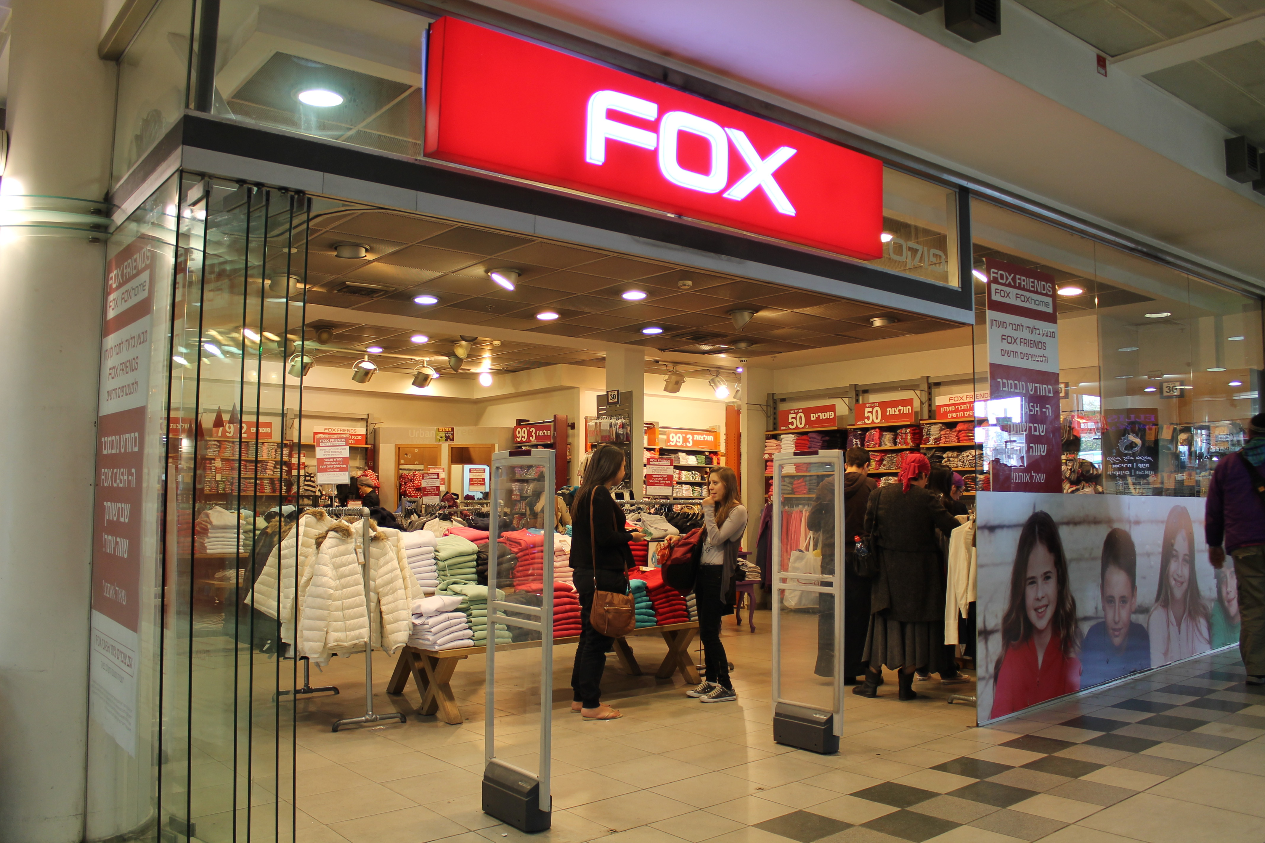 חנות פוקס בתחנה מרכזית ירושלים